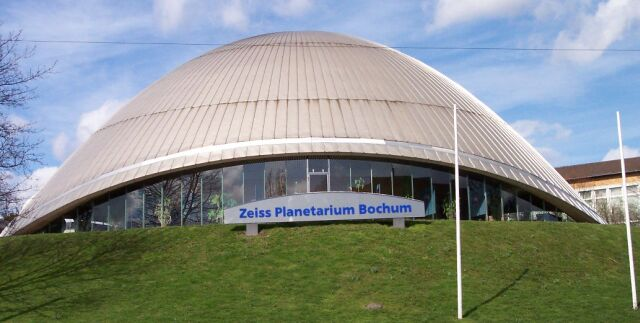 Bild aus Bochum, selbst aufgenommen, GFDL. Das rechts kaum erkennbare Gebäude ist die Hildegardis-Schule.